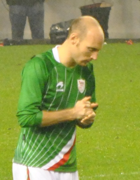 Gaizka Toquero.